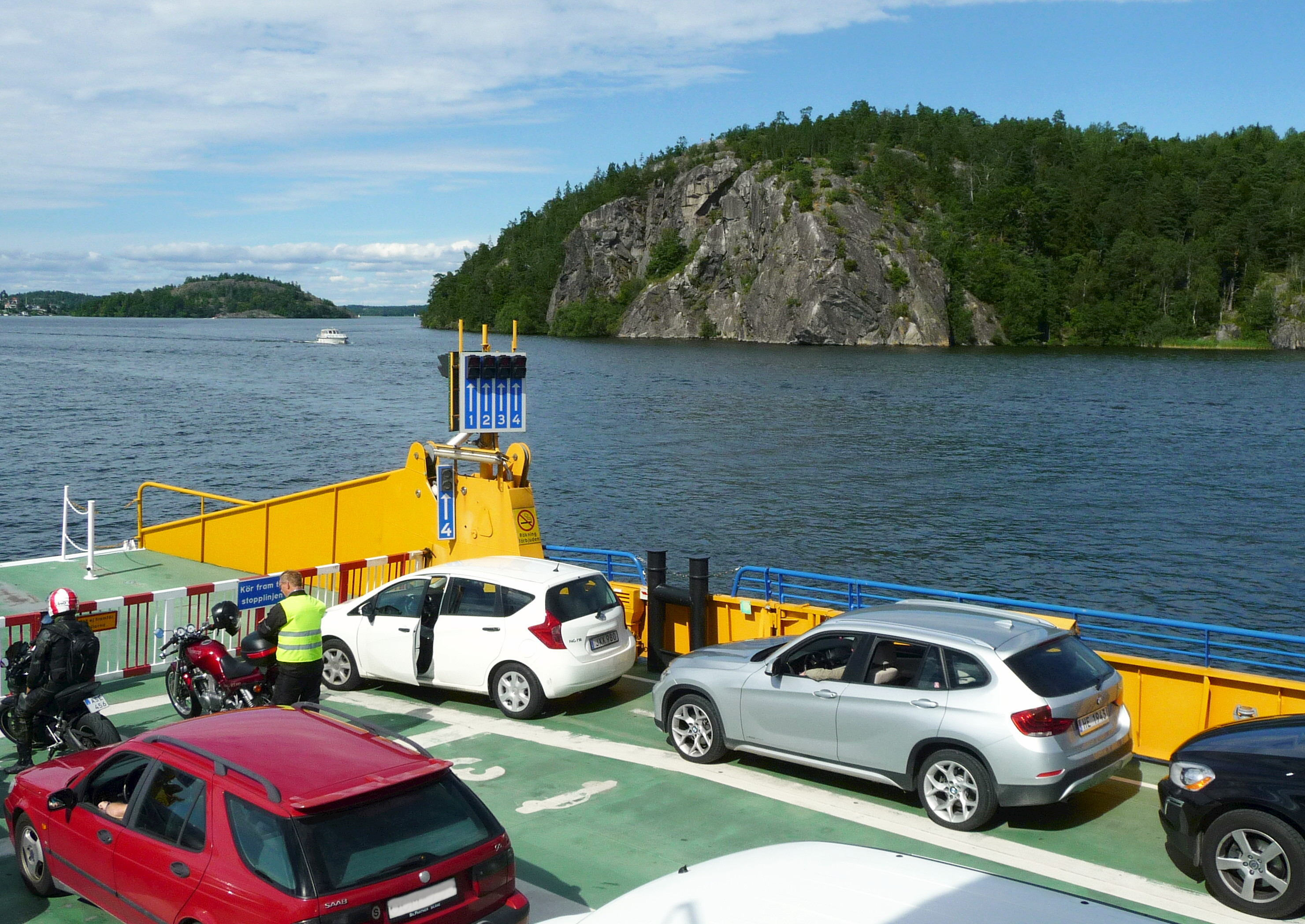 Korpberget sett från Ekeröfärjan vid Slagsta